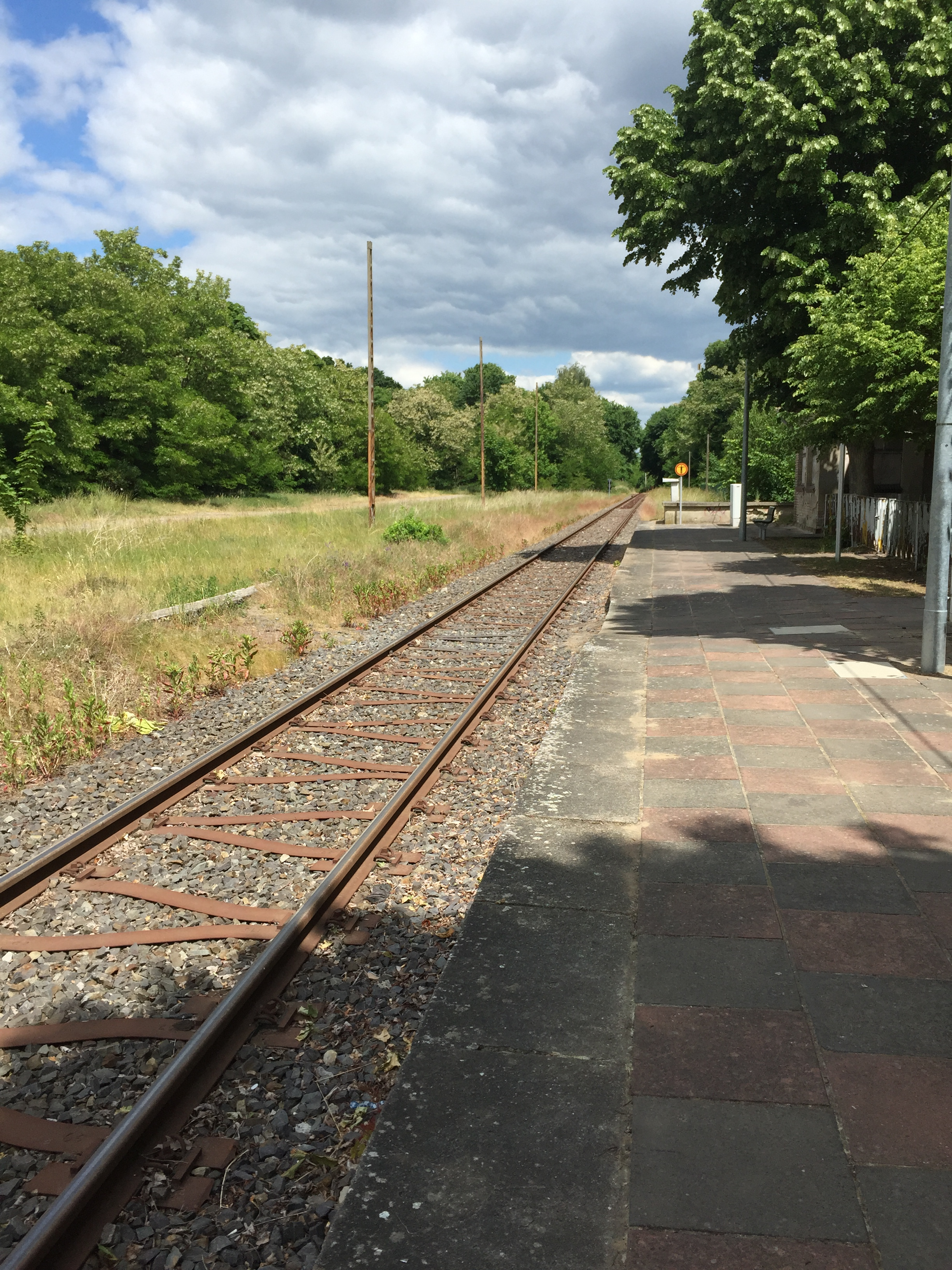 Gleis des Bahnhofs Lindow (Mark)